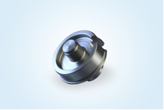 DENSIMET(R)-Einsatz für den Aluminiumguss